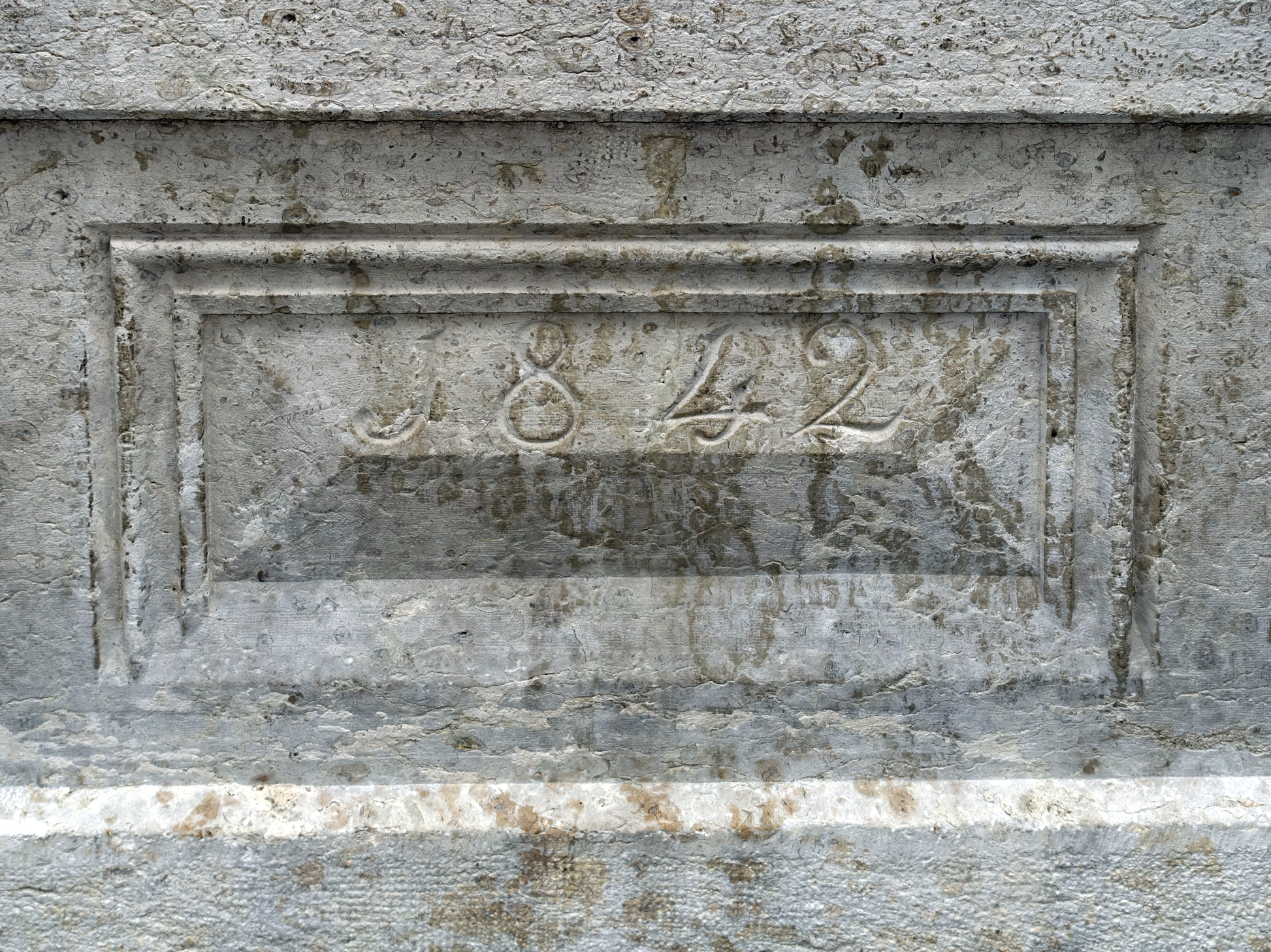 Hans Tussmann (1420–1489) Bildhauer. Jakobsbrunnen, 1842, Gymnasium Kirschgarten, Basel